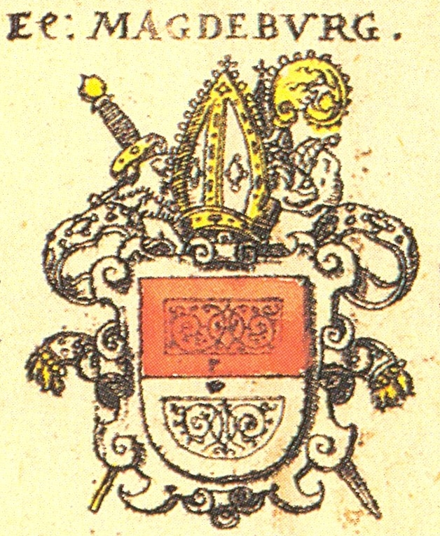 Wappen des Erzbistums Magdeburg nach Siebmachers Wappenbuch